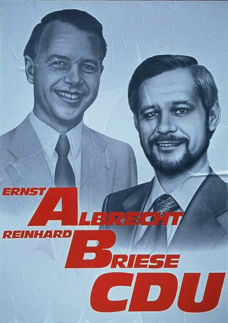 Ernst Albrecht Reinhard Briese CDU Abbildung: Porträtfotos Kommentar: Außenaufnahme (Plakatständer) Plakatart: Kandidaten-/Personenplakat mit Porträt Objekt-Signatur: 10-001: 1948 Bestand: Plakate zu Bundestagswahlen (10-001) GliederungBestand10-18: Plakate zu Bundestagswahlen (10-001) » Die 8. Bundestagswahl am 3. Oktober 1976 » CDU » Mit Porträtfoto Lizenz: KAS/ACDP 10-001: 1948 CC-BY-SA 3.0 DE